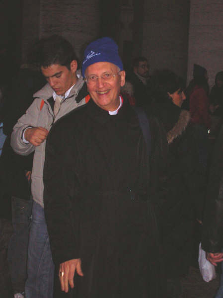 Mons.Vincenzo D'Addario, Arcivescovo di Teramo-Atri.Piazza San Pietro - Città del Vaticano (30 Novembre 2005, poche ore prima della sua morte)